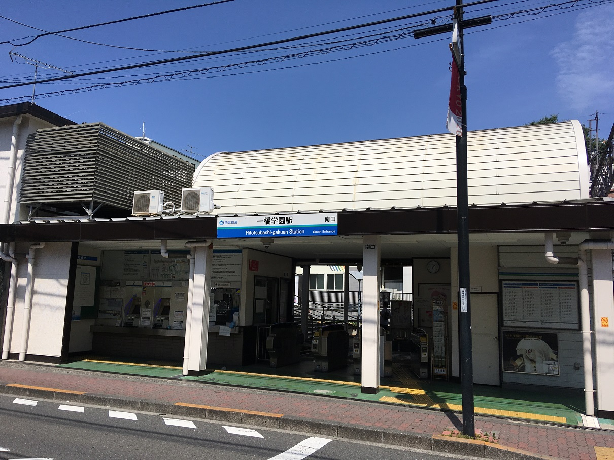 一橋学園駅南口